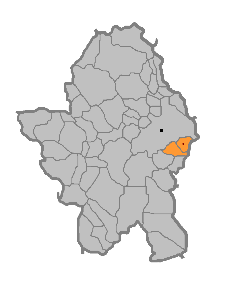 Мјесна заједница Дебељаци